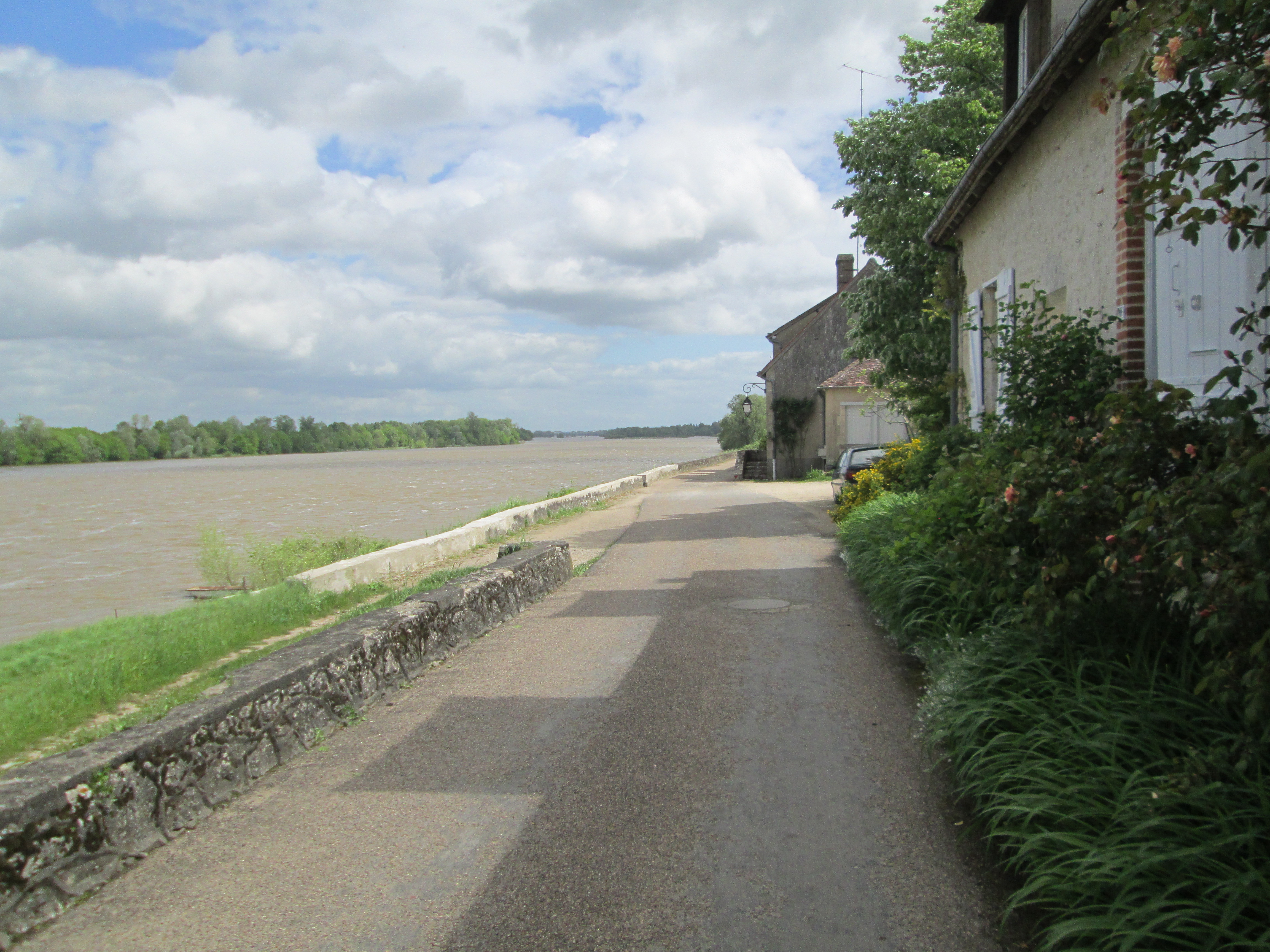 May 5, 2015